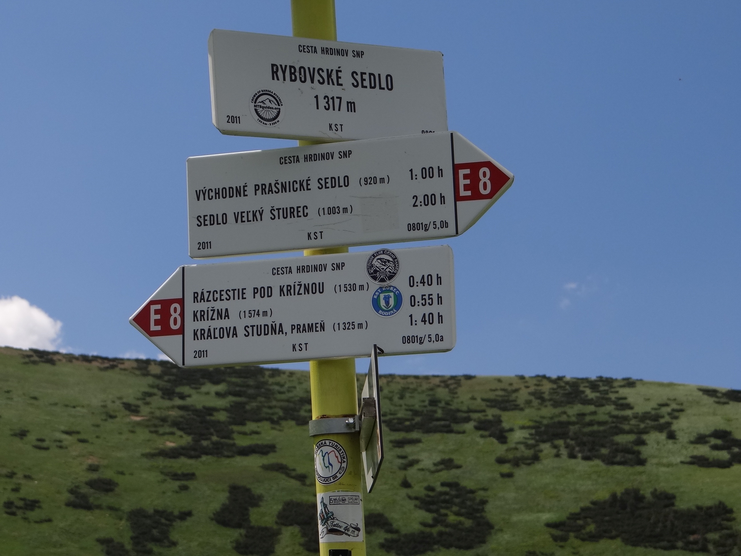 Rybovskè sedlo